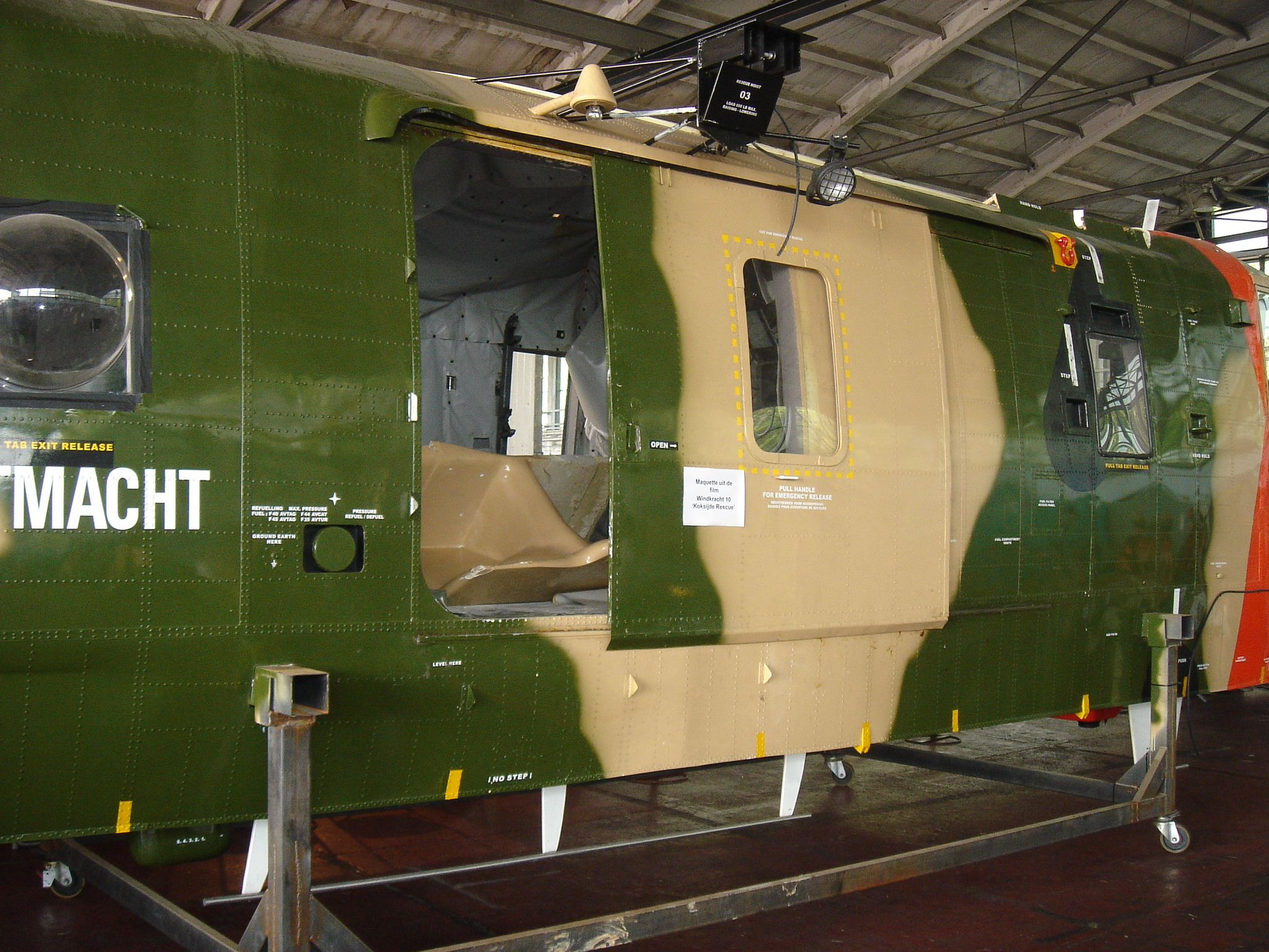 Maquette van Sea King, gebruikt voor de film van Windkracht 10. Foto genomen tijdens airshow Koksijde.